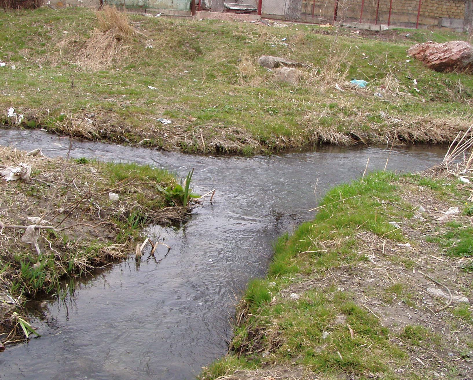 Место впадения реки Абдалка в Малый Салгир. Крым, Симферополь